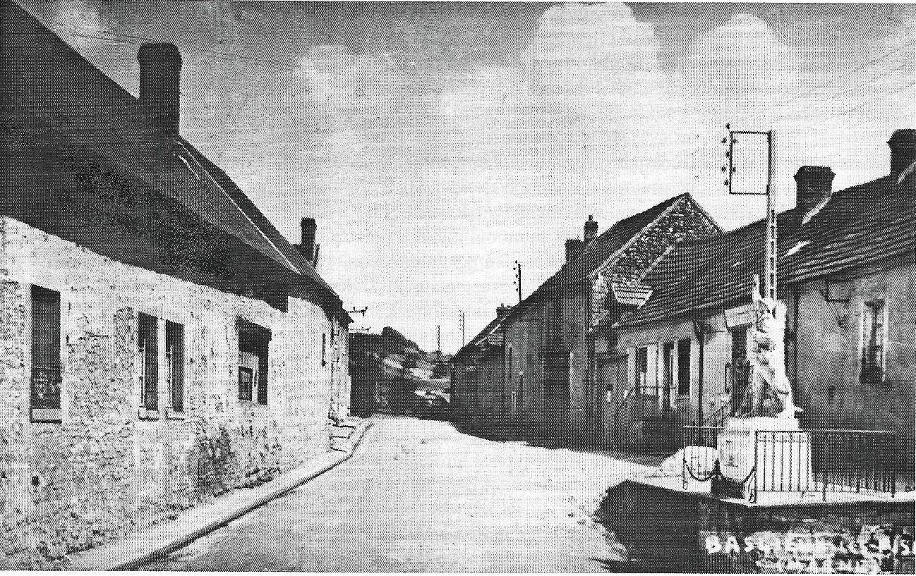 une vue de Baslieux-lès-Fismes.